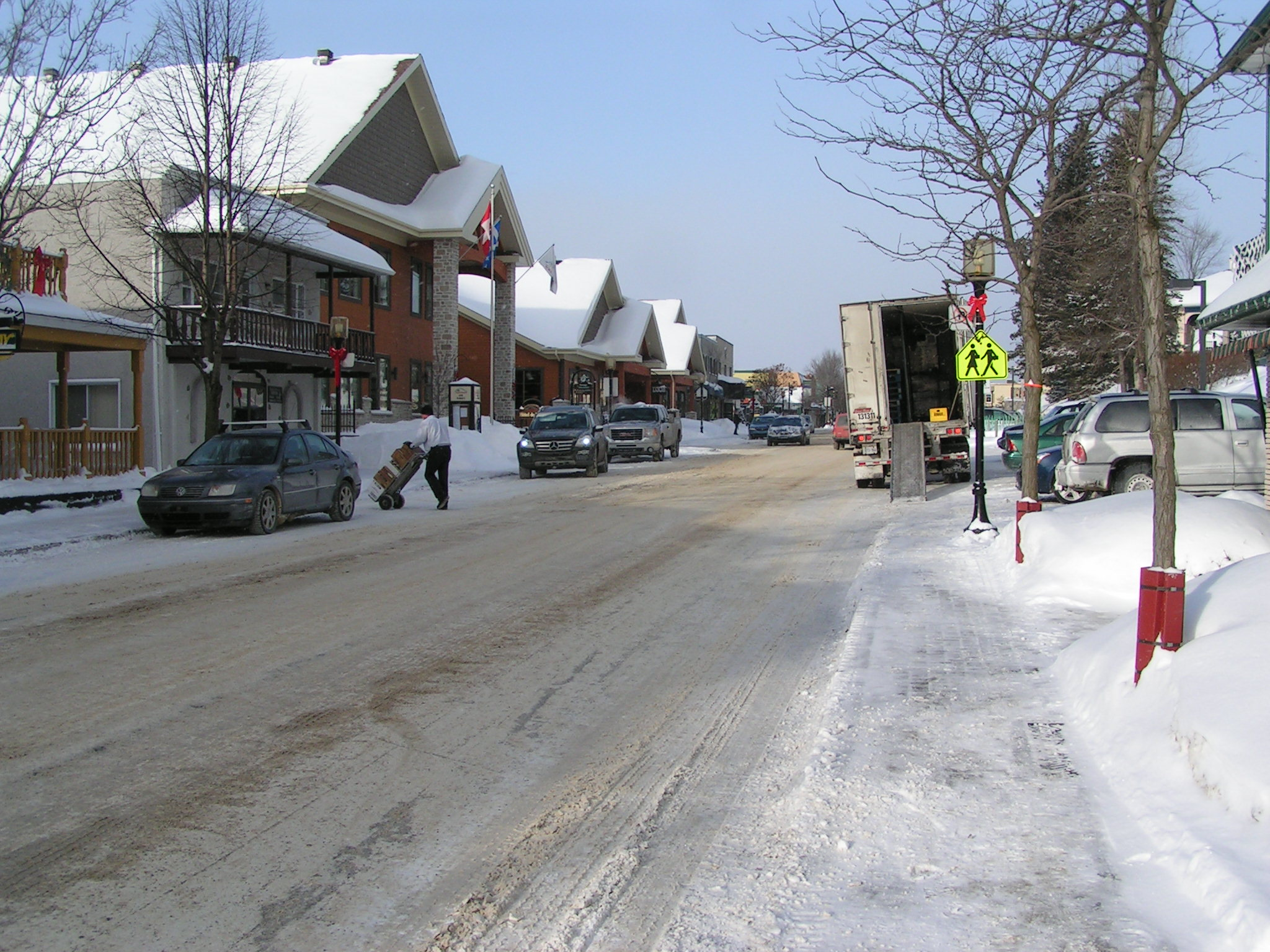 La rue principale et l'hôtel de ville de Saint-Donat au Québec